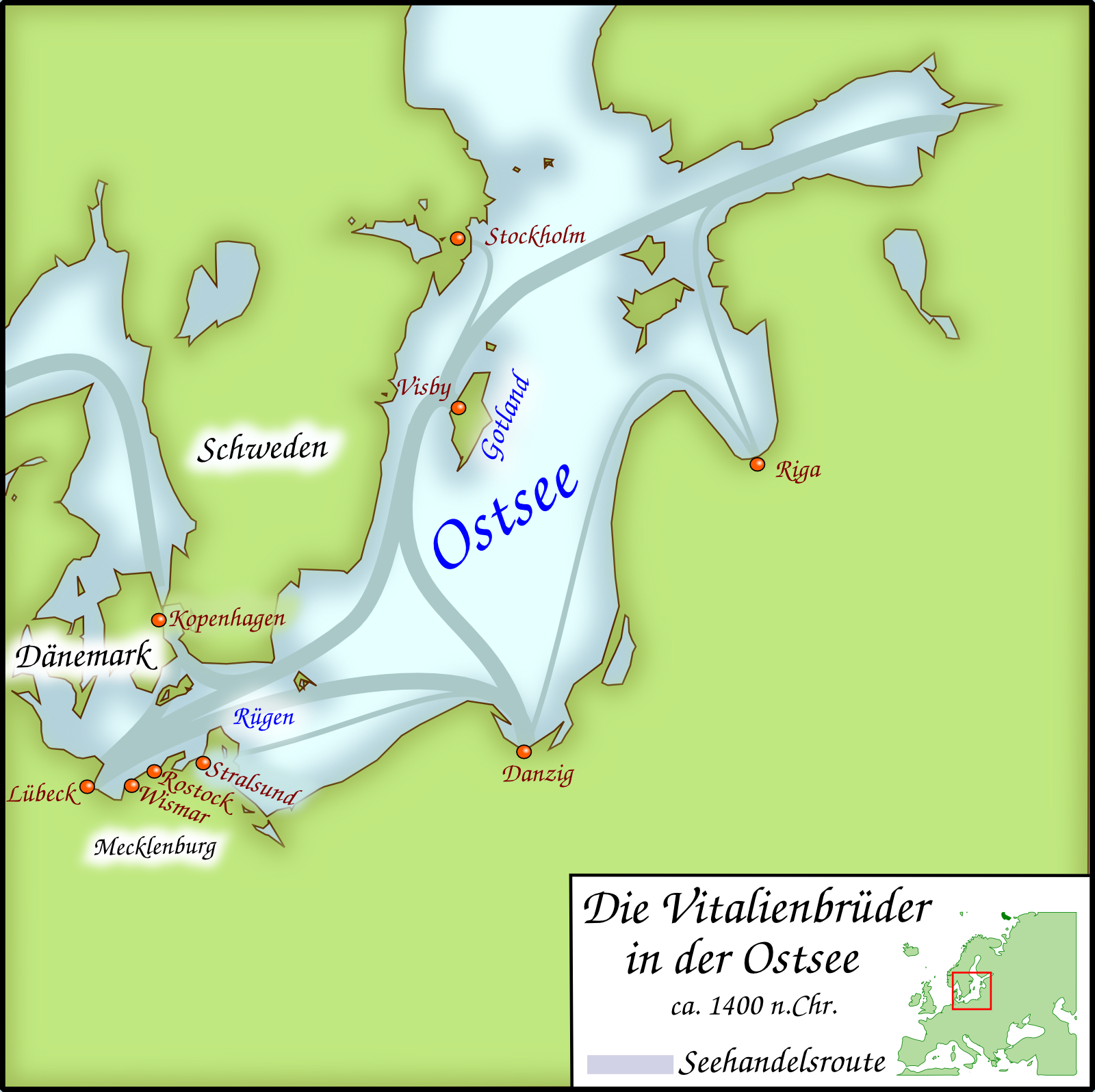 Der Ostseeraum um 1400 mit relevanten Orten im Zusammenhang mit den Vitalienbrüdern inkl. Seehandelsrouten der Hanse